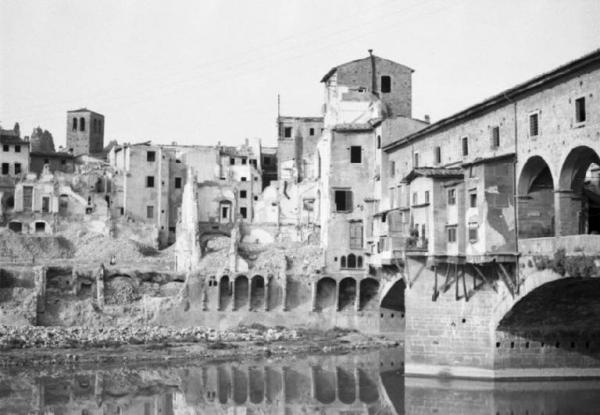 Italia Dopoguerra. Firenze. Il Lungarno devastato e Ponte Vecchio risparmiato dai bombardamenti.